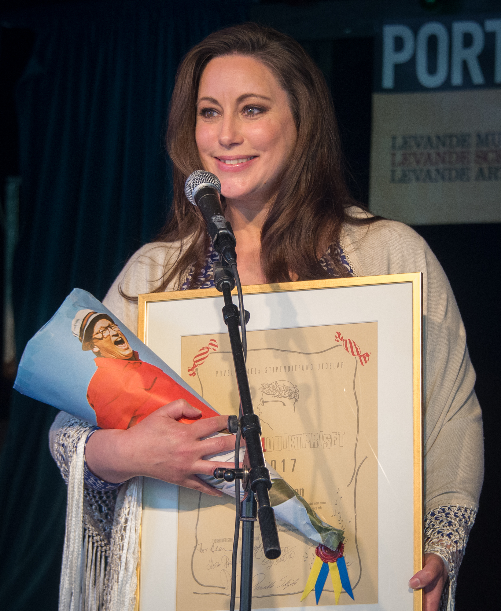 KaRAMELodiktstipendiet 2017 går till Lisa Nilsson.